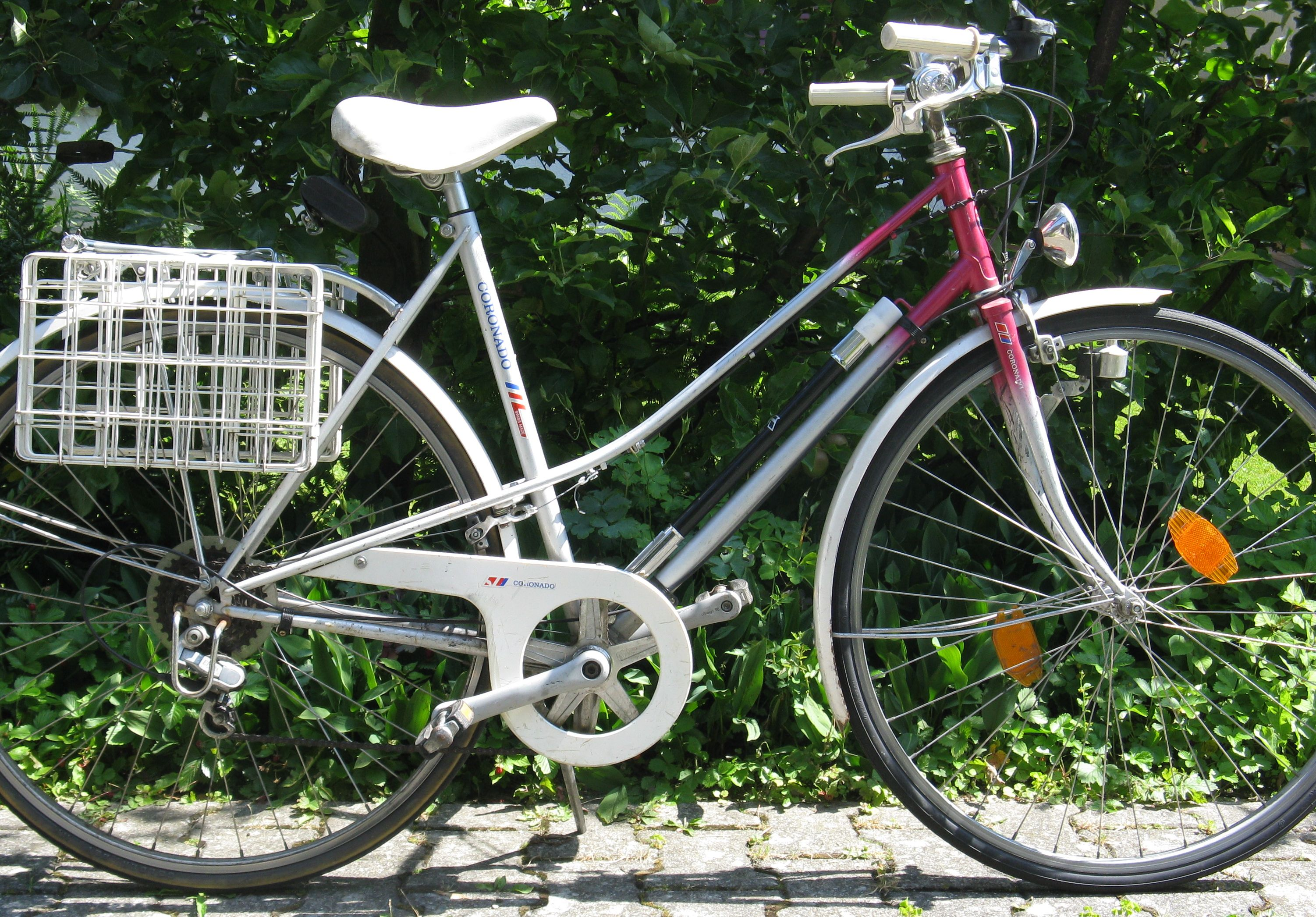 Fahrrad mit Anglaise-Rahmen